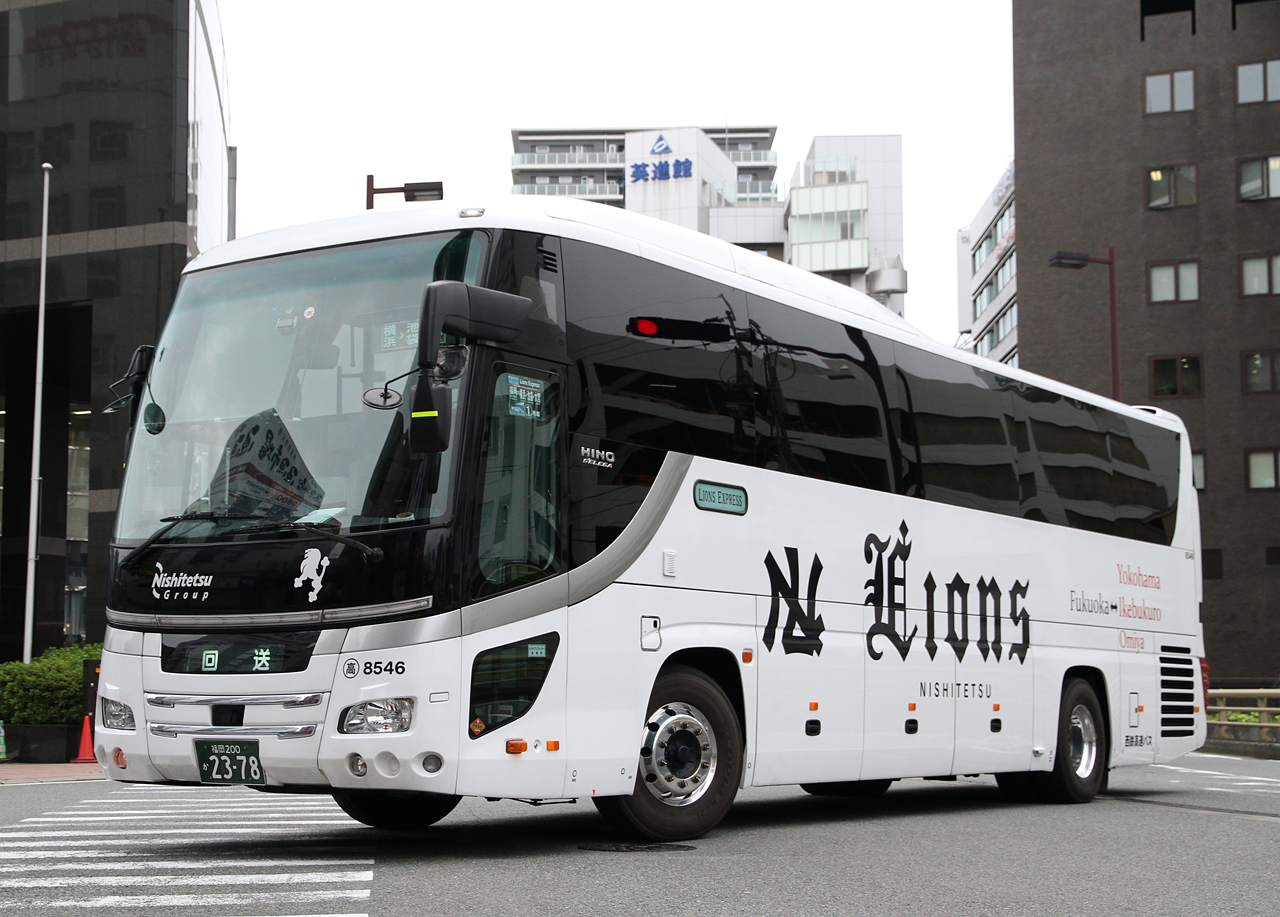 ・登録番号 福岡200か23-78 ・社番：8546 ・西鉄高速バス㈱福岡支社所属 ・夜行高速路線用車両 ・2014年6月23日 福岡市中央区にて撮影 ・撮影者 Zondag2000